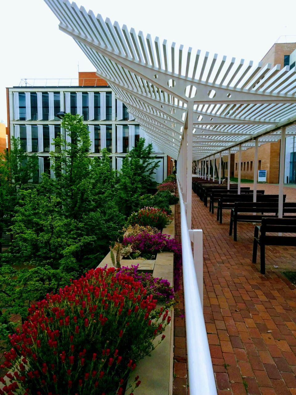 روبروی ساختمان‌های C4 دانشگاه UPC در کمپ شمالی